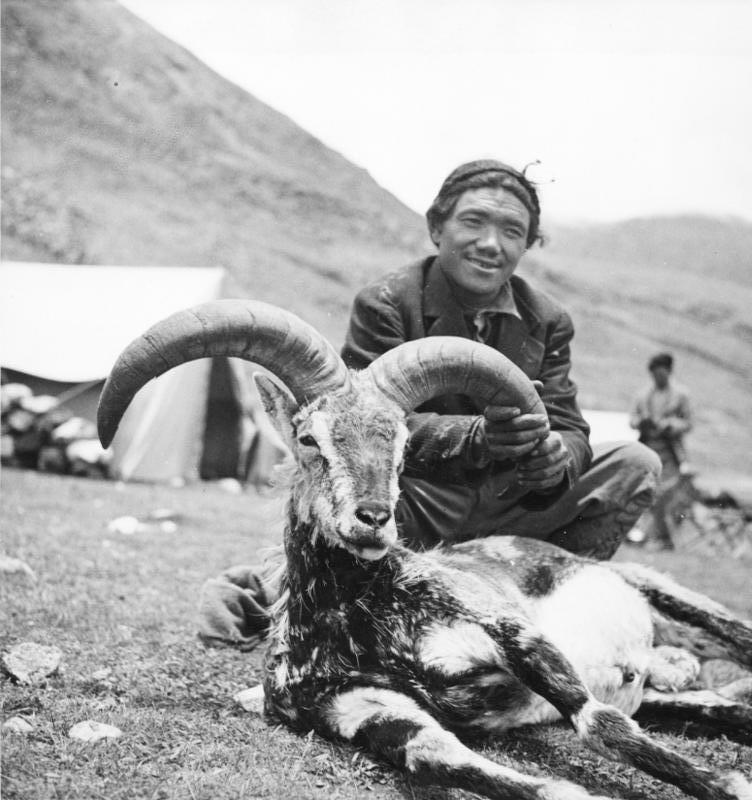 Tibetexpedition, Erlegter Blauschafwidder Wildaufnahmen: Pansy mit erlegtem Blauschafbock [Pansy, Pancy; Blauschaf, Bharal]